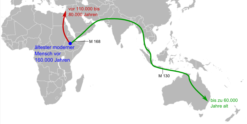 Karte über die Ausbreitung des Menschen von Afrika über Asien nach Australien.